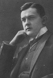 Georg af Klercker (1877-1951)